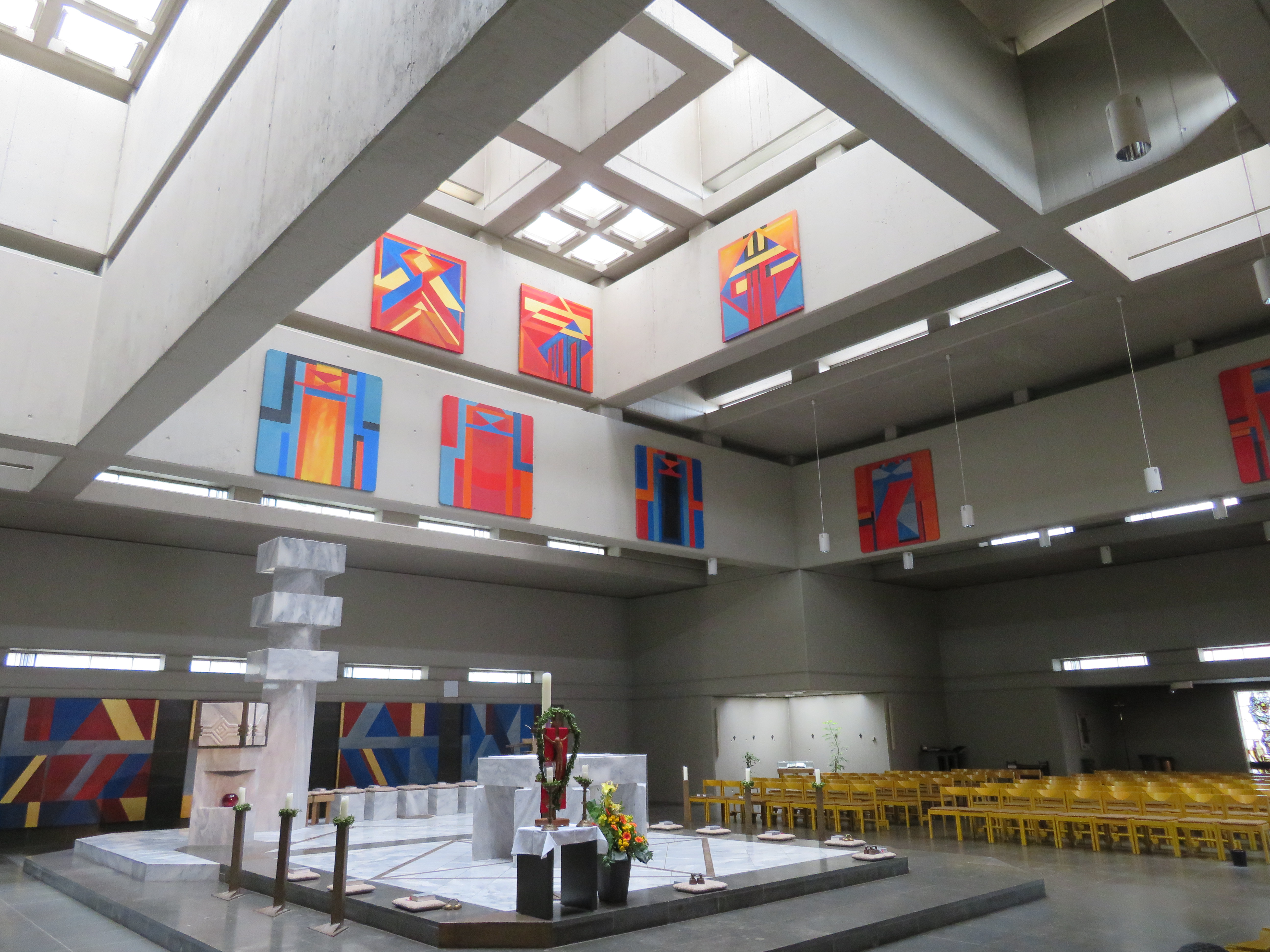 St Michael, Trier-Mariahof, Altarraum; sichtbar 3 Bildgalerien